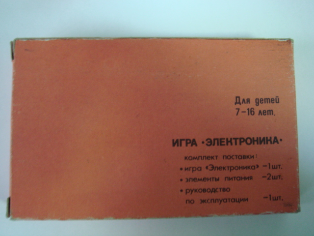 Коробка от карманных игр Электроника (задняя сторона)